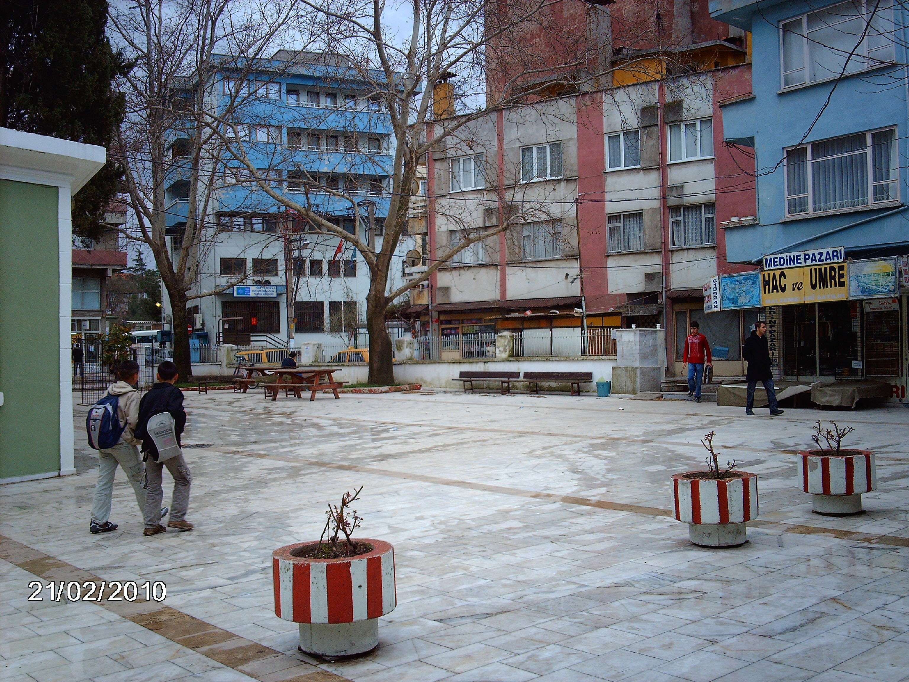 ŞEYH MÜFTÜ CAMMİ AVLUSU